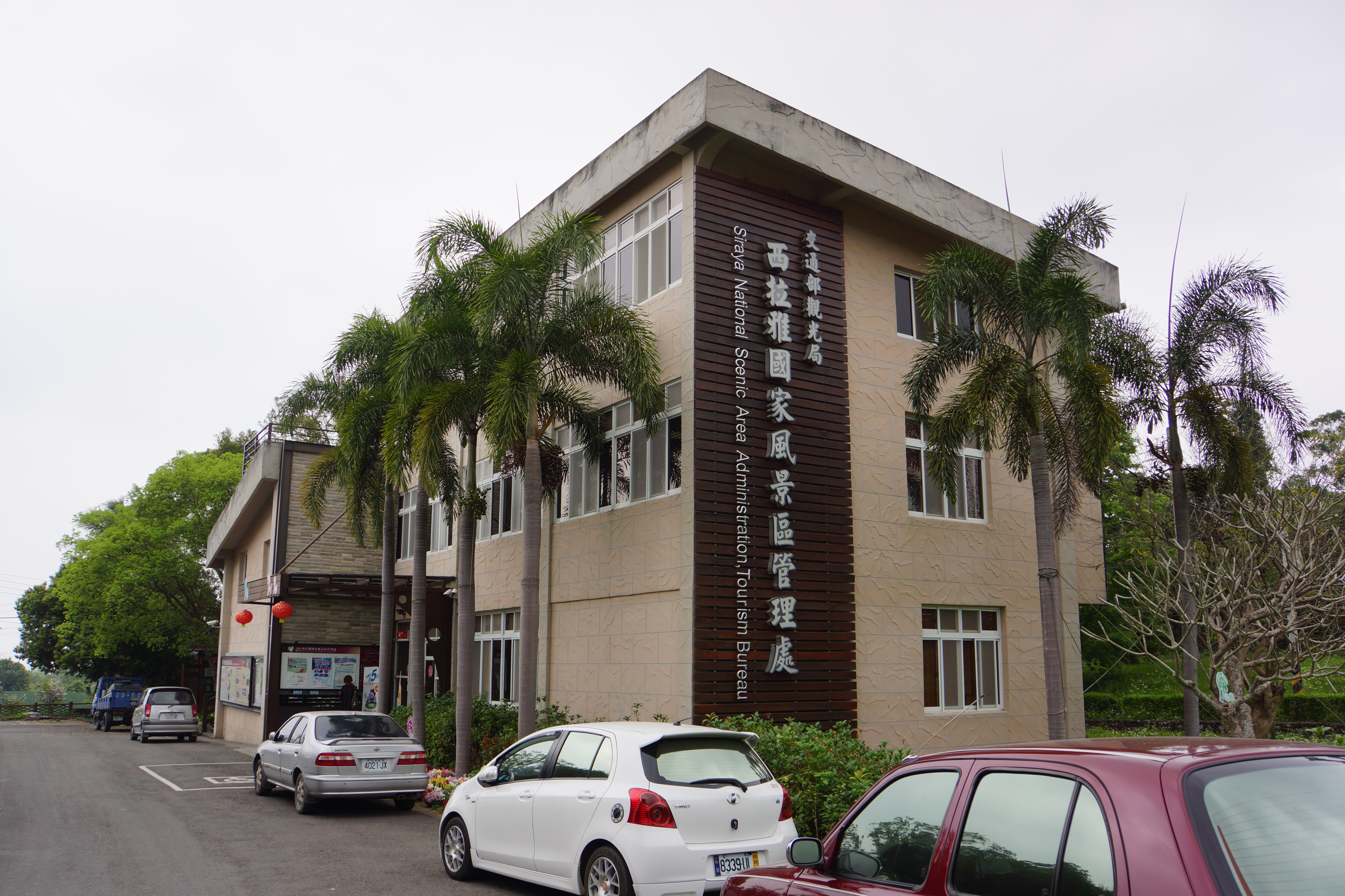 交通部觀光局西拉雅國家風景區管理處辦公大樓，位於臺南巿白河區仙草里仙草1之1號，2009年完工。